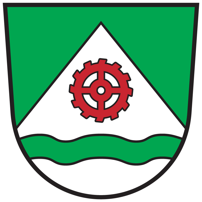 Wappen von Stockenboi